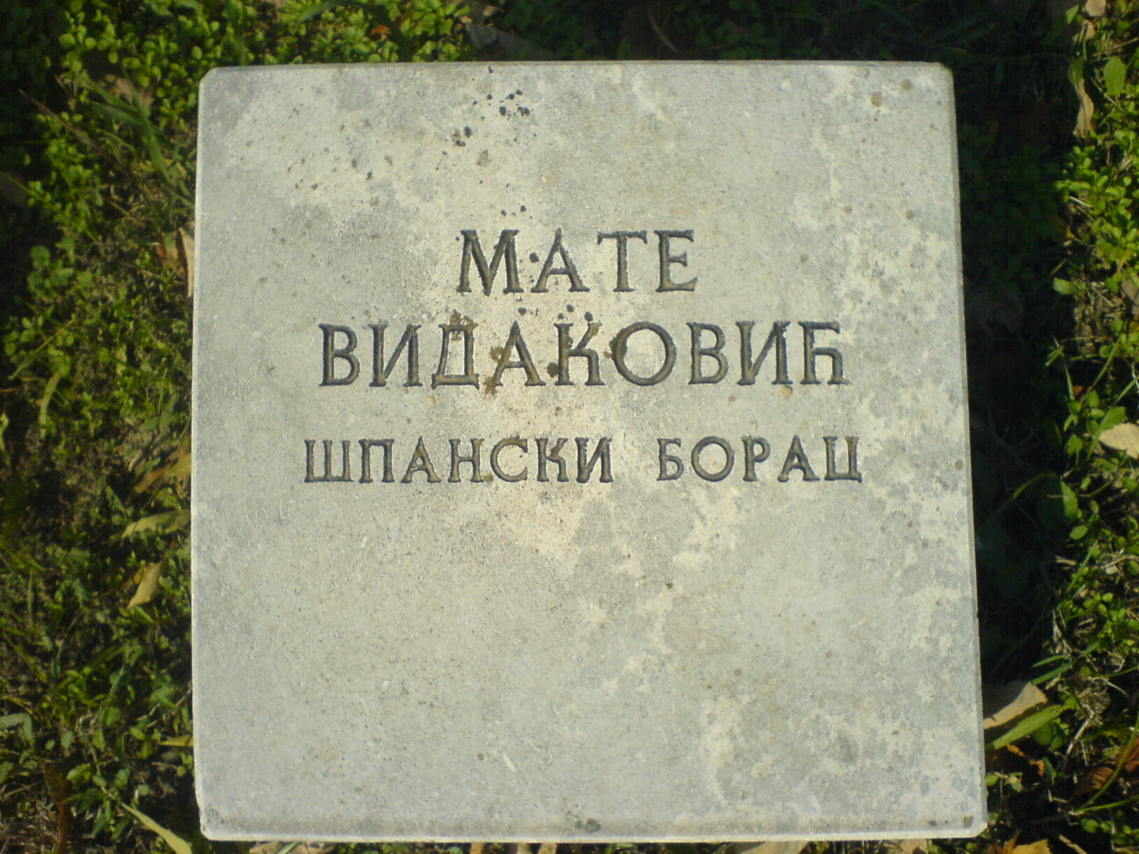 Grob Mate Vidakovića.